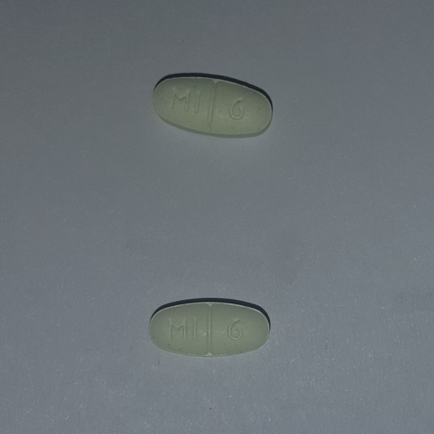 비습관성 불면증 치료제 (명인제약의 사일레노 제네릭)